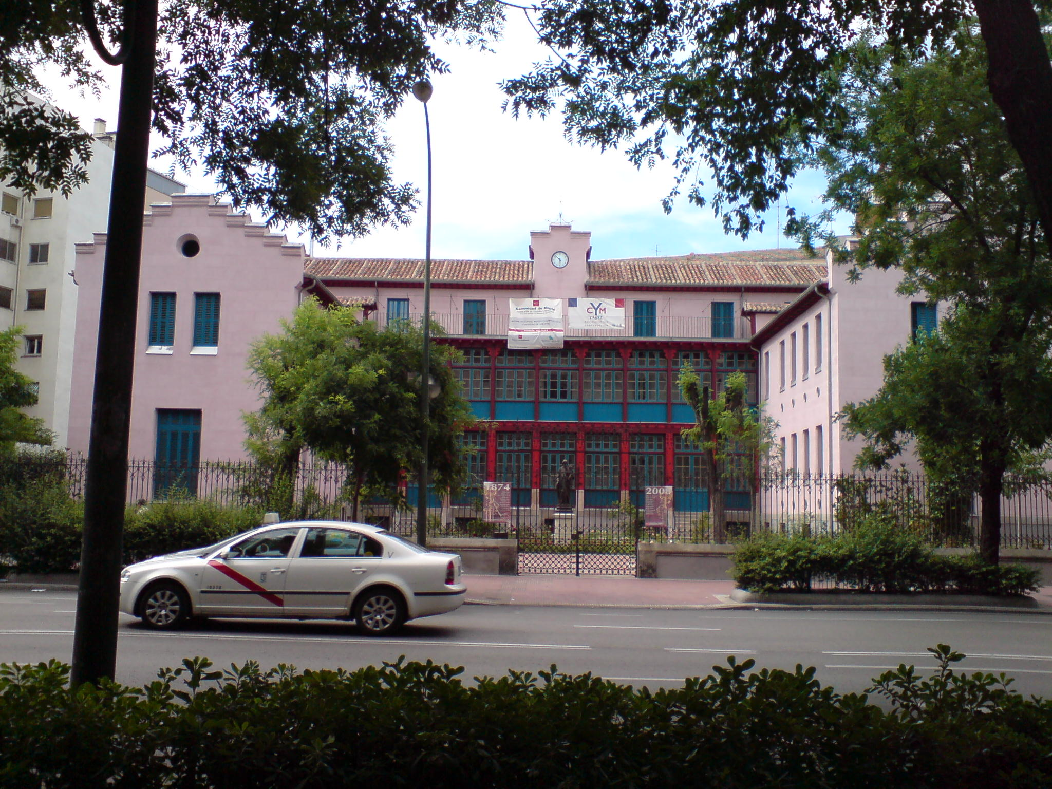 Instituto Homeopático y Hospital de San José tras su reconstrucción